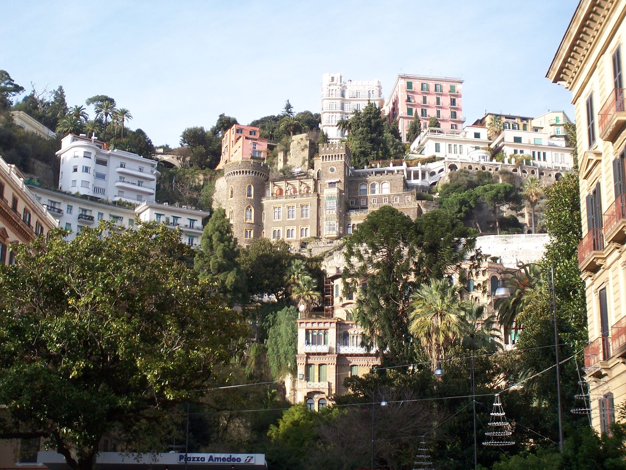 Parte superiore del quartiere Chiaia, vista da Piazza Amedeo: la stazione della metropolitana e Villa Maria (ex-Hotel Eden), edifici del Parco Grifeo (Castello Aselmeyer), gli ultimi edifici di Via Palizzi (limite quartiere Vomero) tra cui la Palazzina Russo Ermoli. Foto scattata nel dicembre 2008 (luci natalizie sospese sulla piazza) Licensing Foto scattata da me